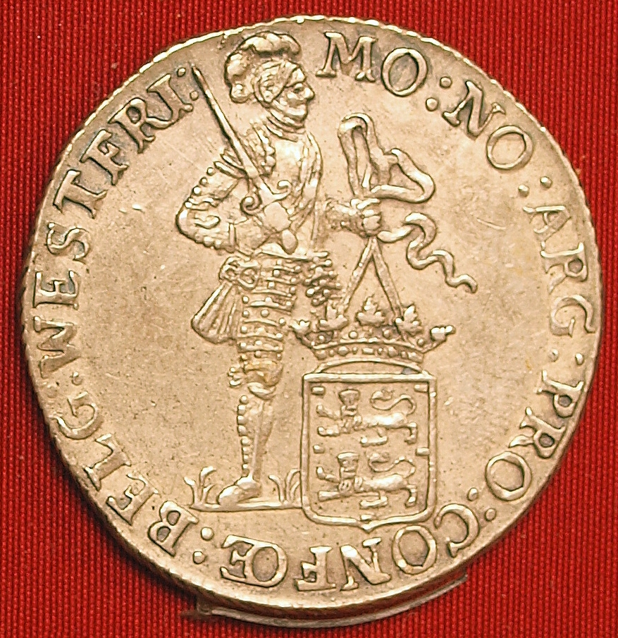 West Friesland, zilveren dukaat1794, Enkhoorn.